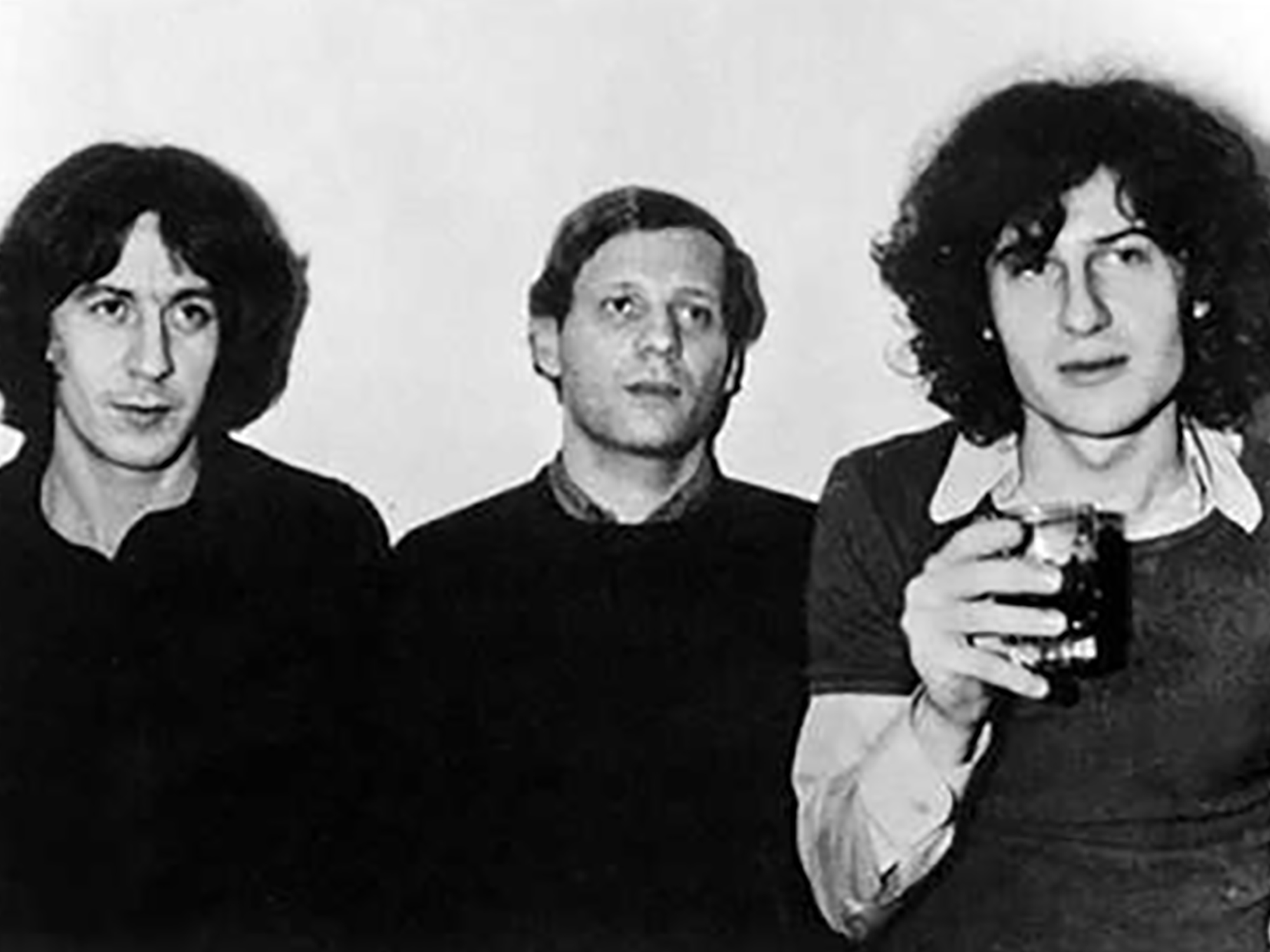 Jobbról balra: Cseh Tamás, Bereményi Géza és Másik János.